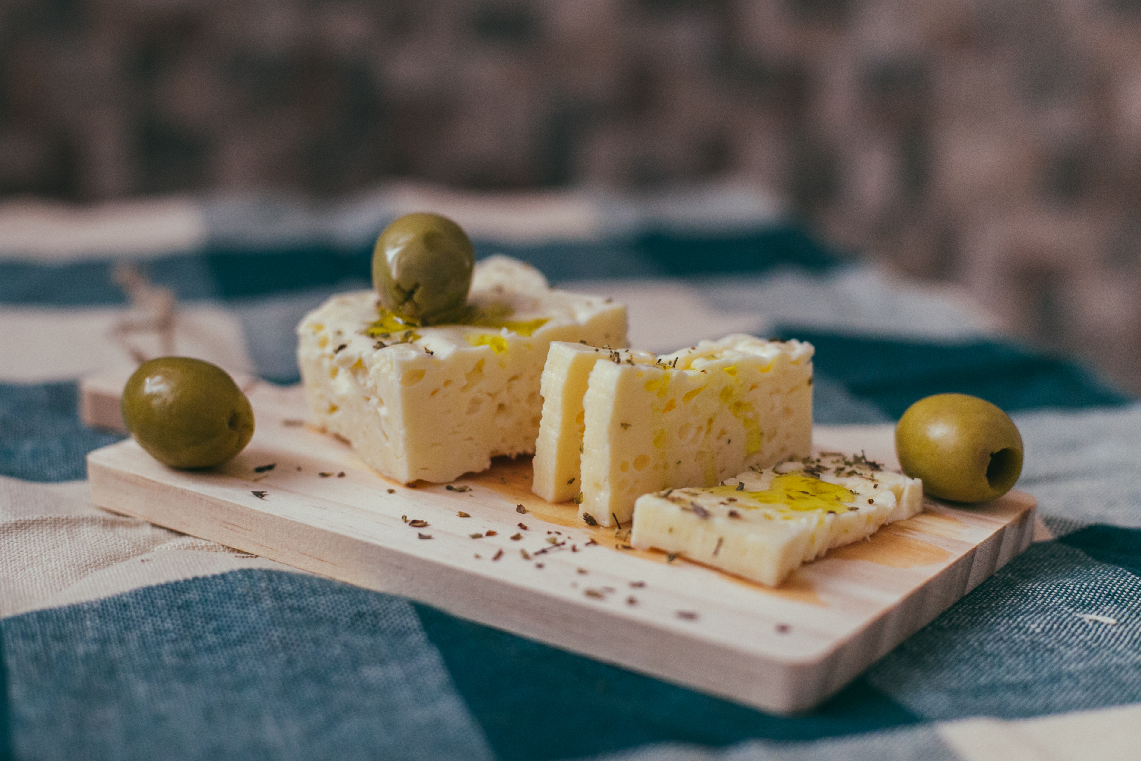 Биено сирење